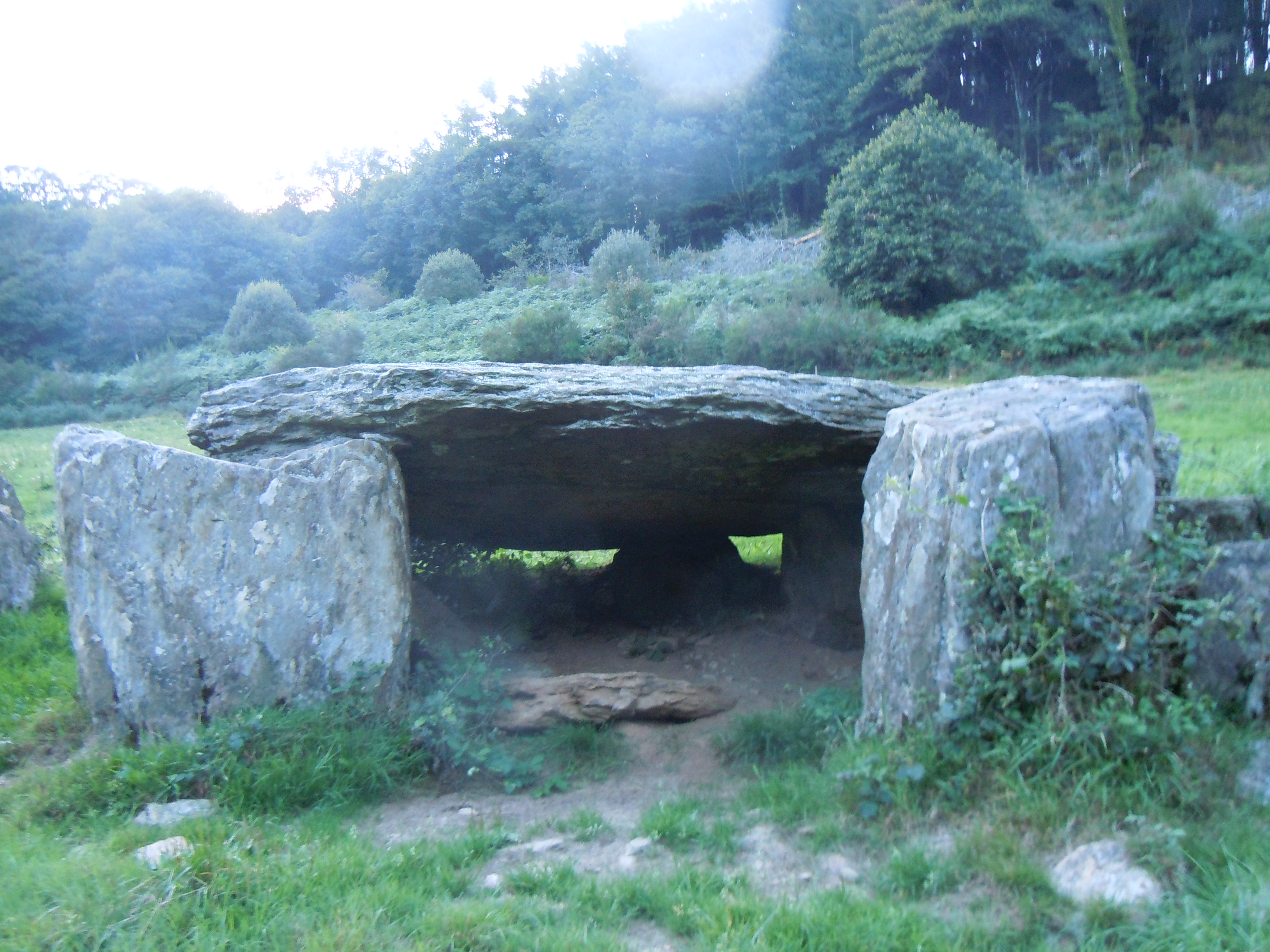 une des tables encore visibles de l'allée couverte de Minguionnet, commune de Gourin, département du Morbihan, France